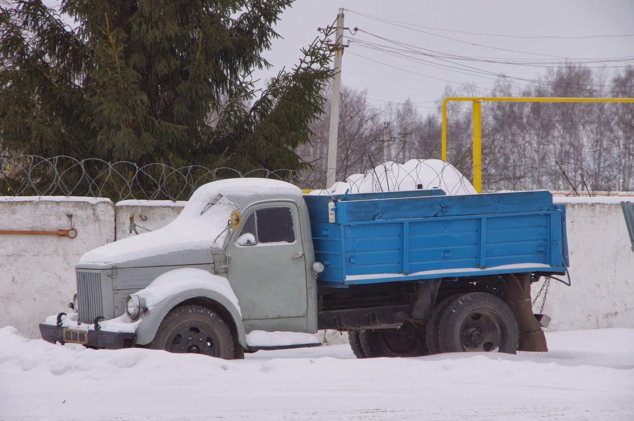 Bebyaevo, Nizhegorodskaya oblast', Russia